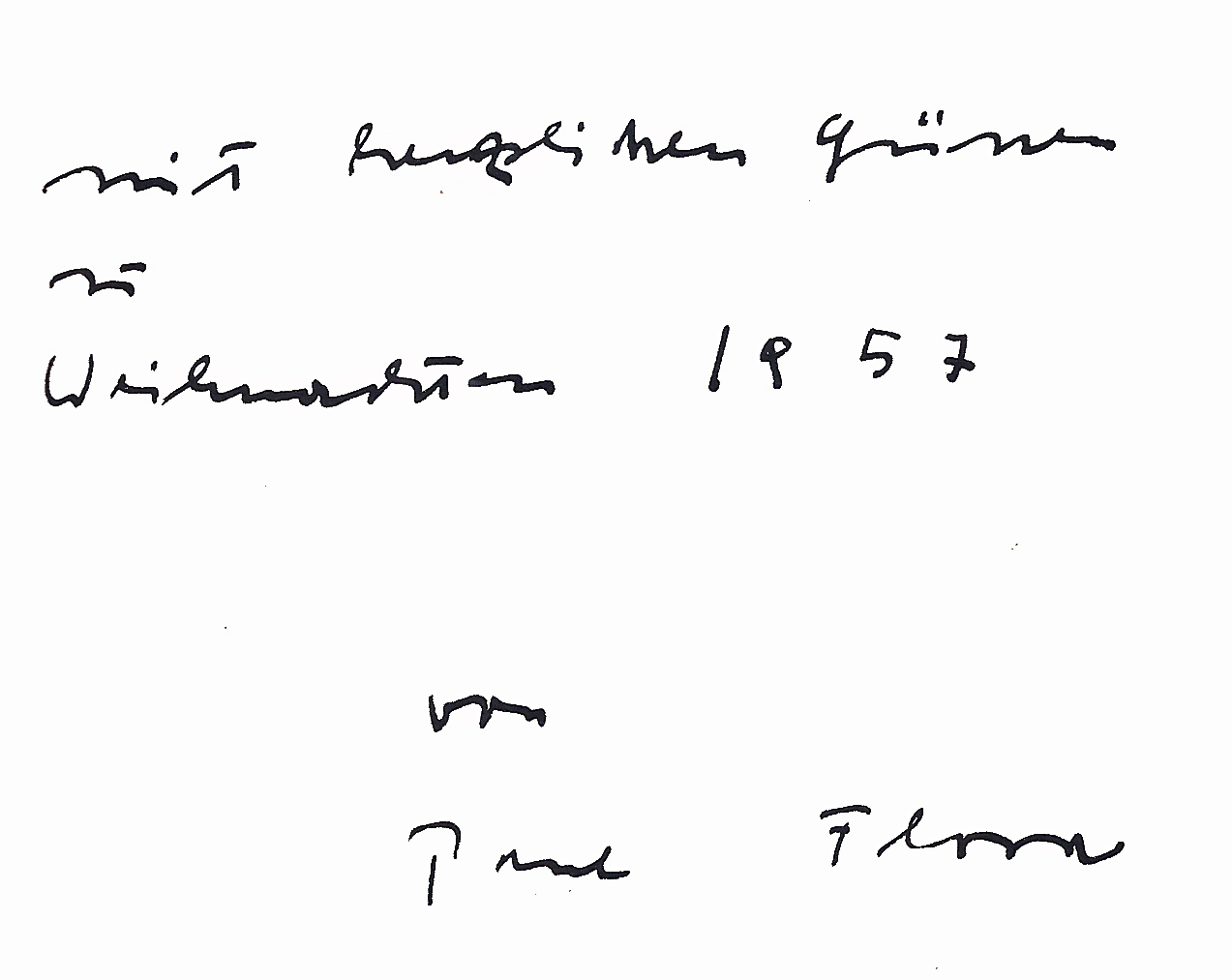 Paul Flora schickte 1957 mir sein Buch »Floras Fauna« mit eigenhändigerm Weihnachtsgruß und Zeichnung .